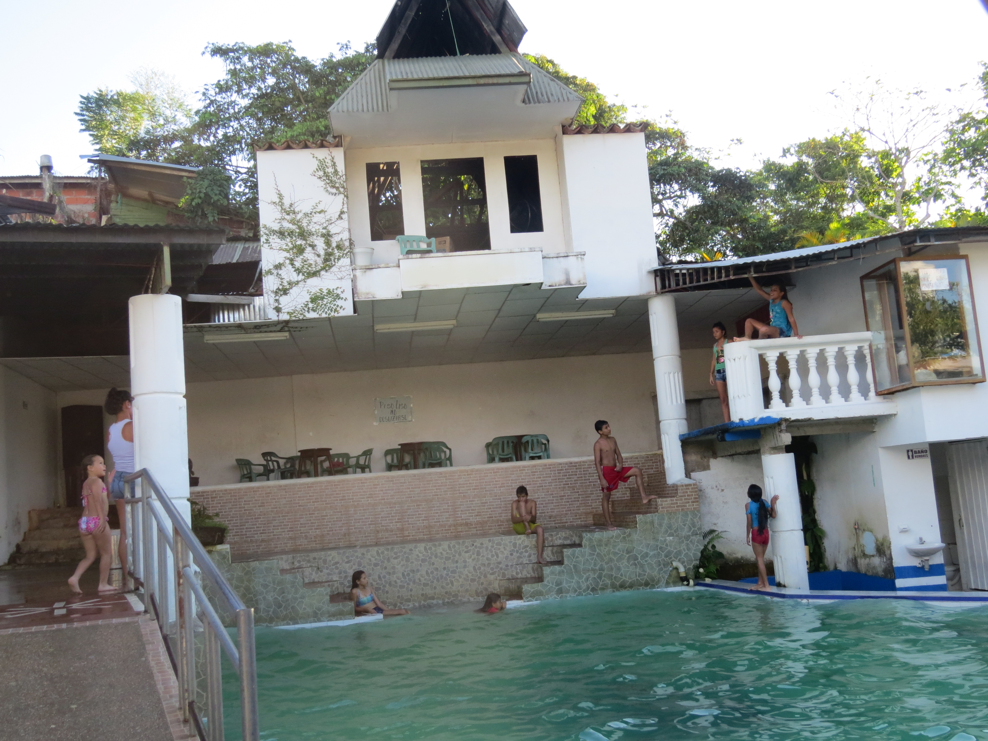 Zona de recreación.